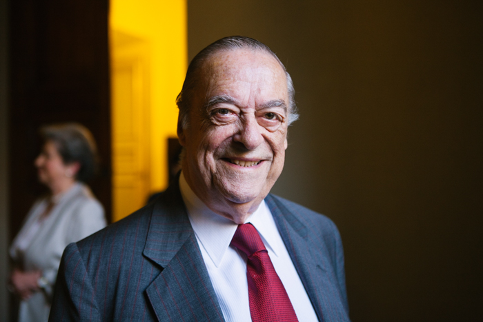 Alfredo Etcheberry, abogado chileno.